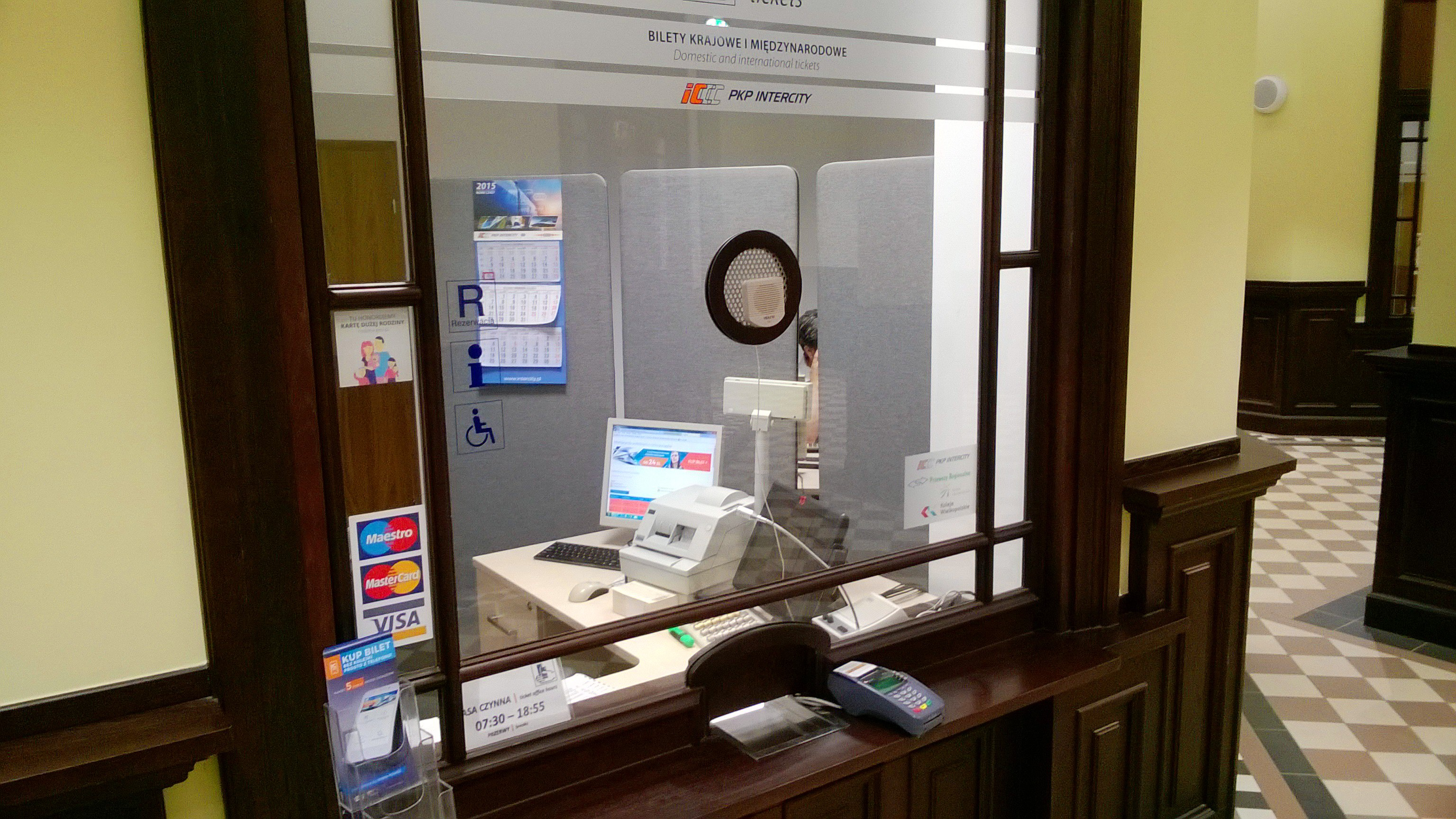 Toruń Główny, kasa